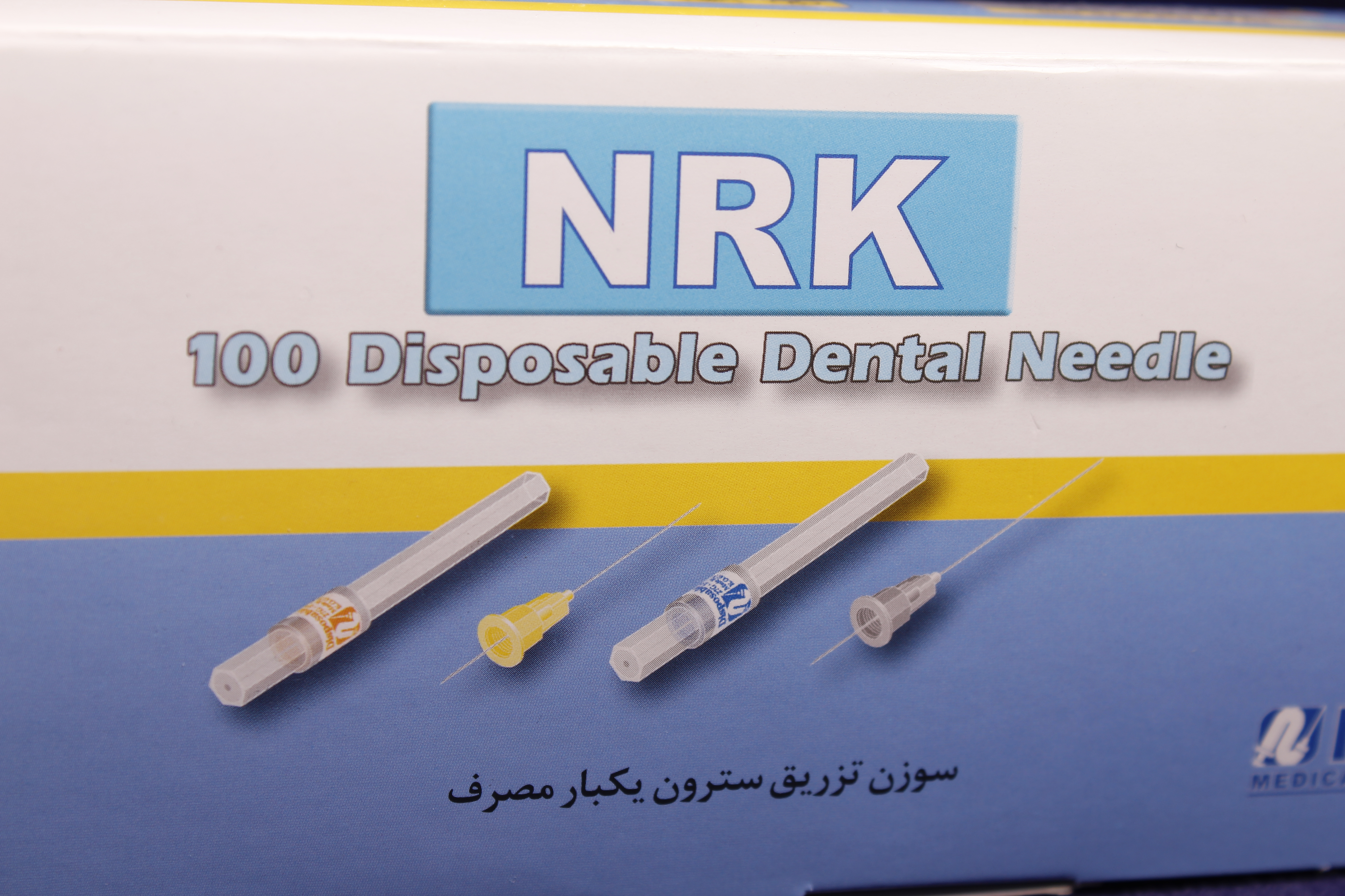 ftject dental product